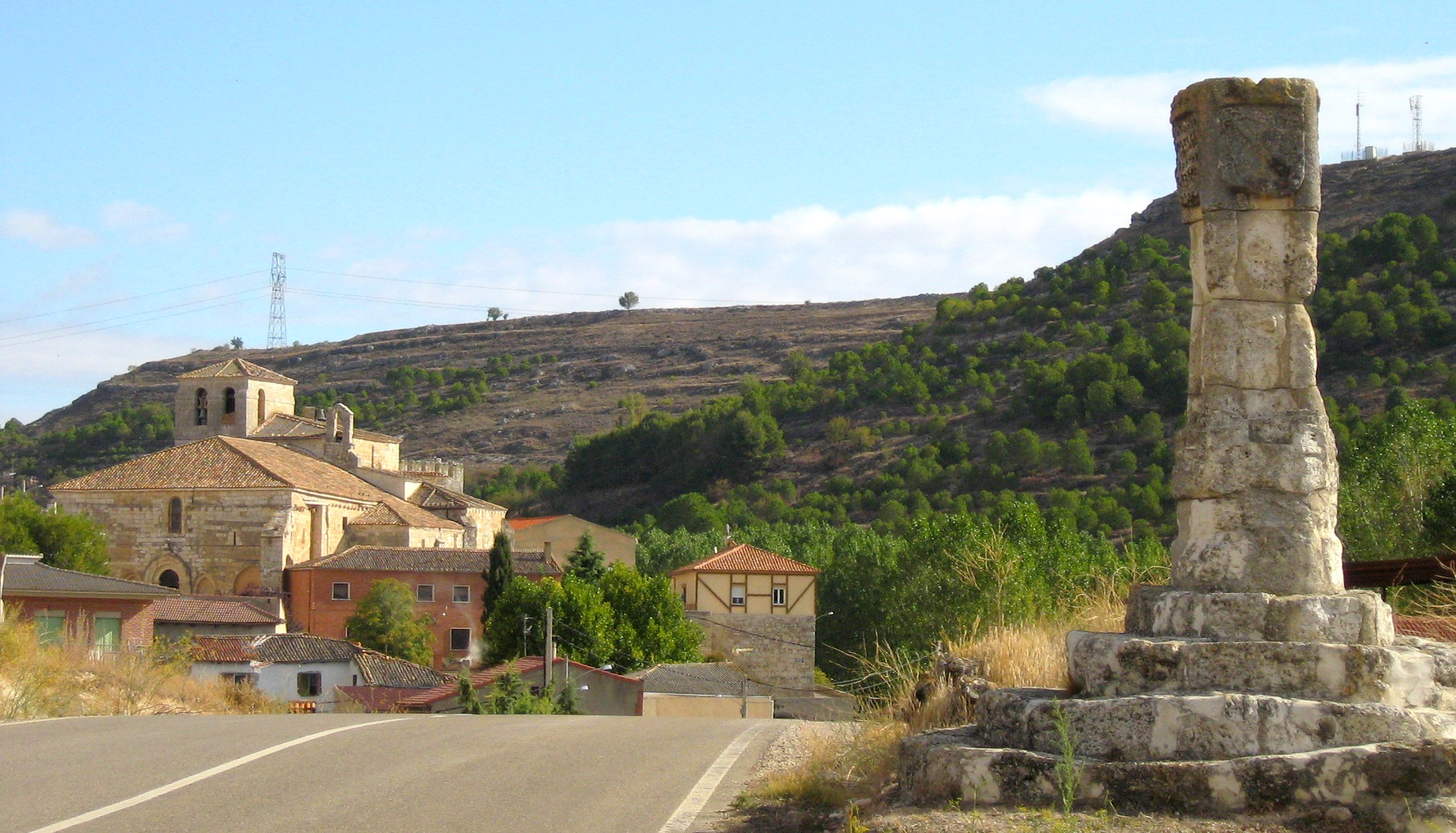 Curiel de Duero. Iglesia de Santa María. Rollo de Justicia. Valle del Cuco. Valladolid.